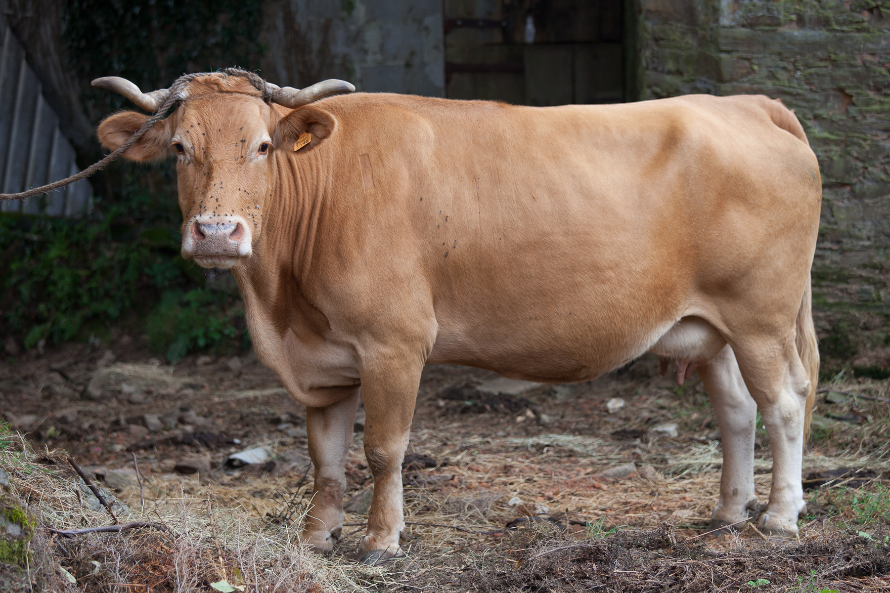 Vaca rubia en Cumbraos, Mesía, Galiza.